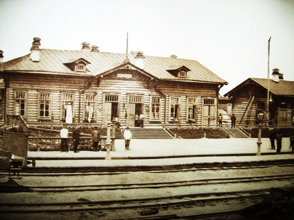 На фото 1915 год. В течении ХХ века вокзал несколько раз перестраивался и простоял до 1987 года